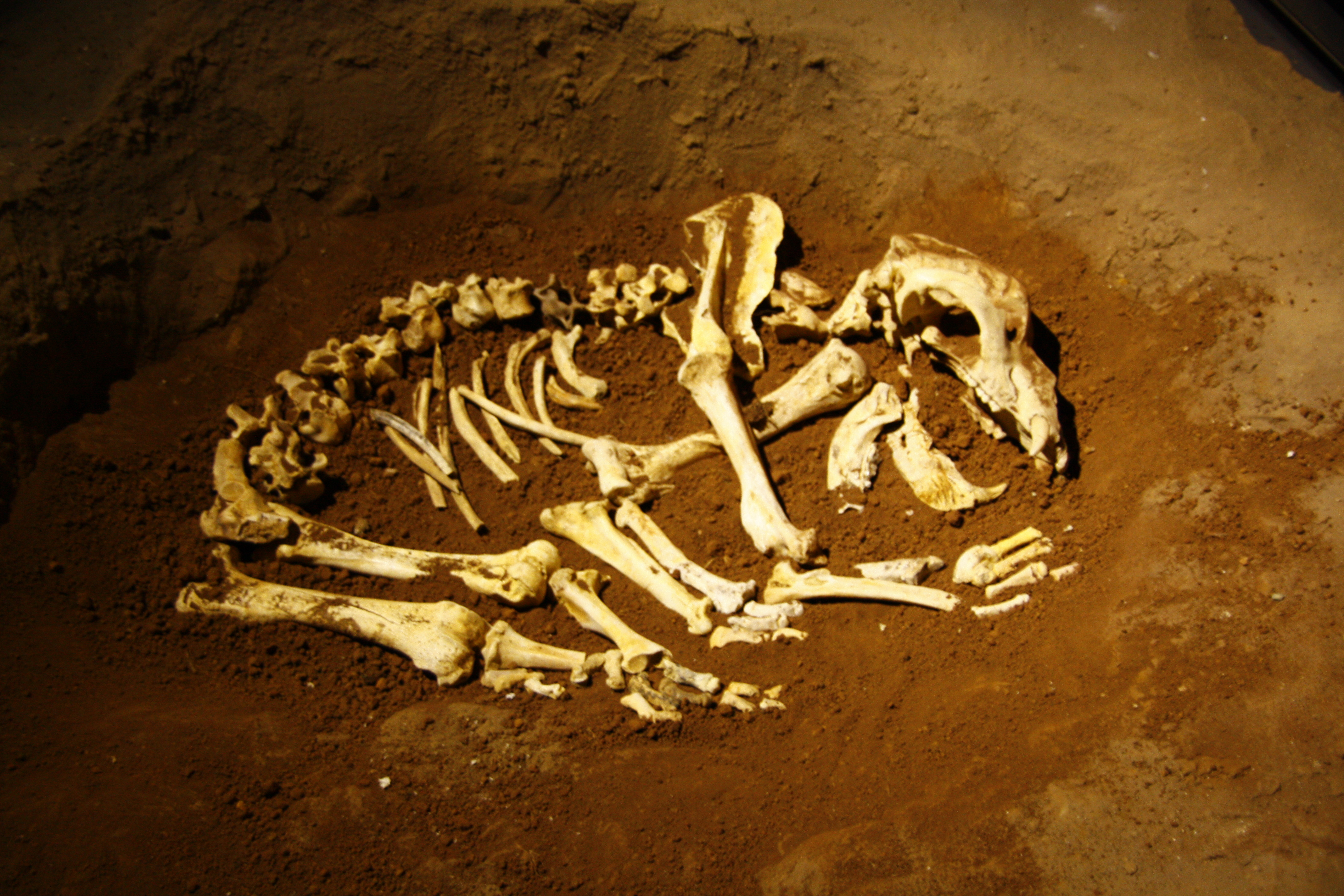 Leize-hartz baten hezurdura Ekainberriko erreplikan. Hezurdura Ekaineko kobatik ekarritako benetazko hartz batena da.